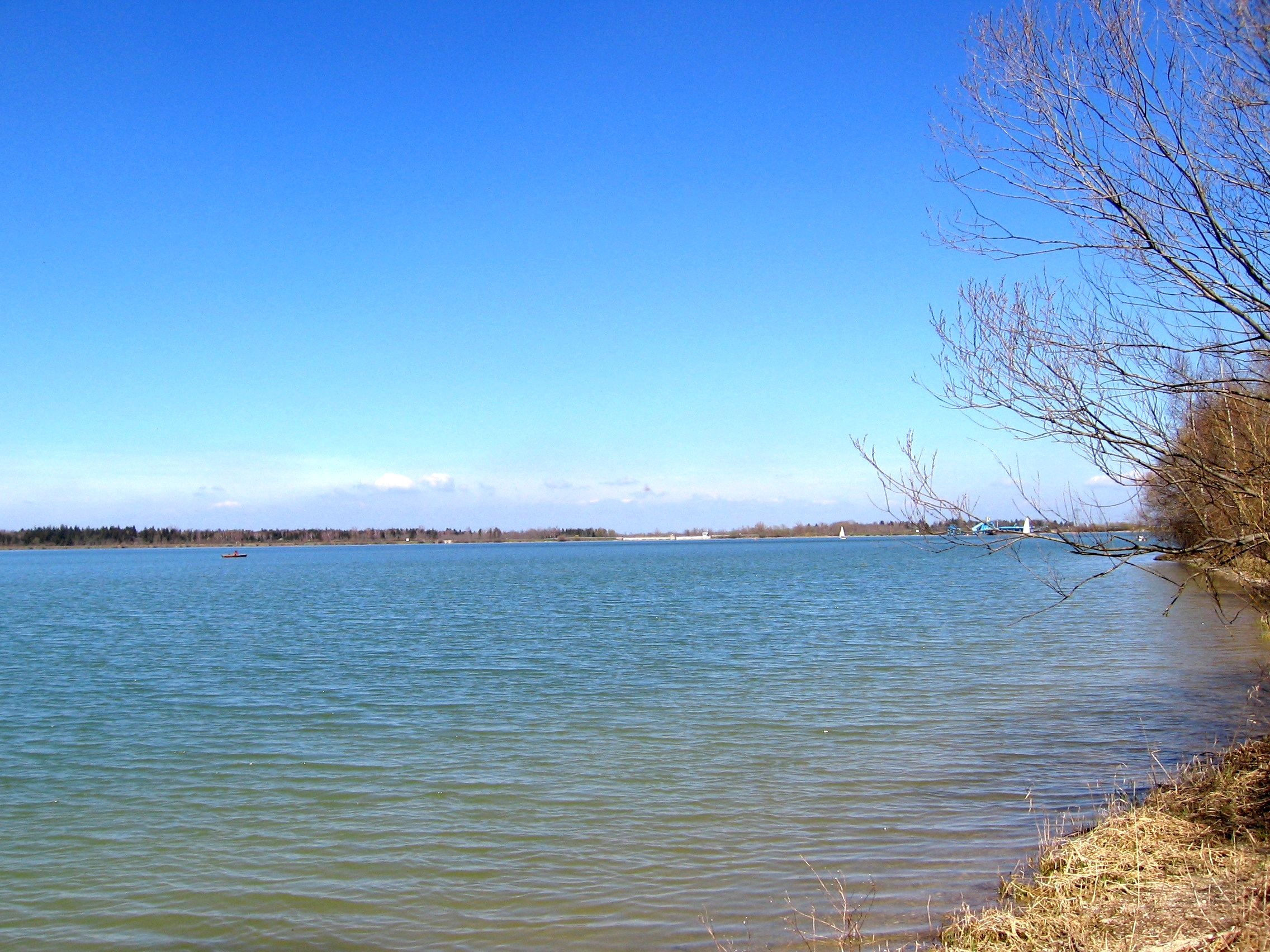 Mandichosee